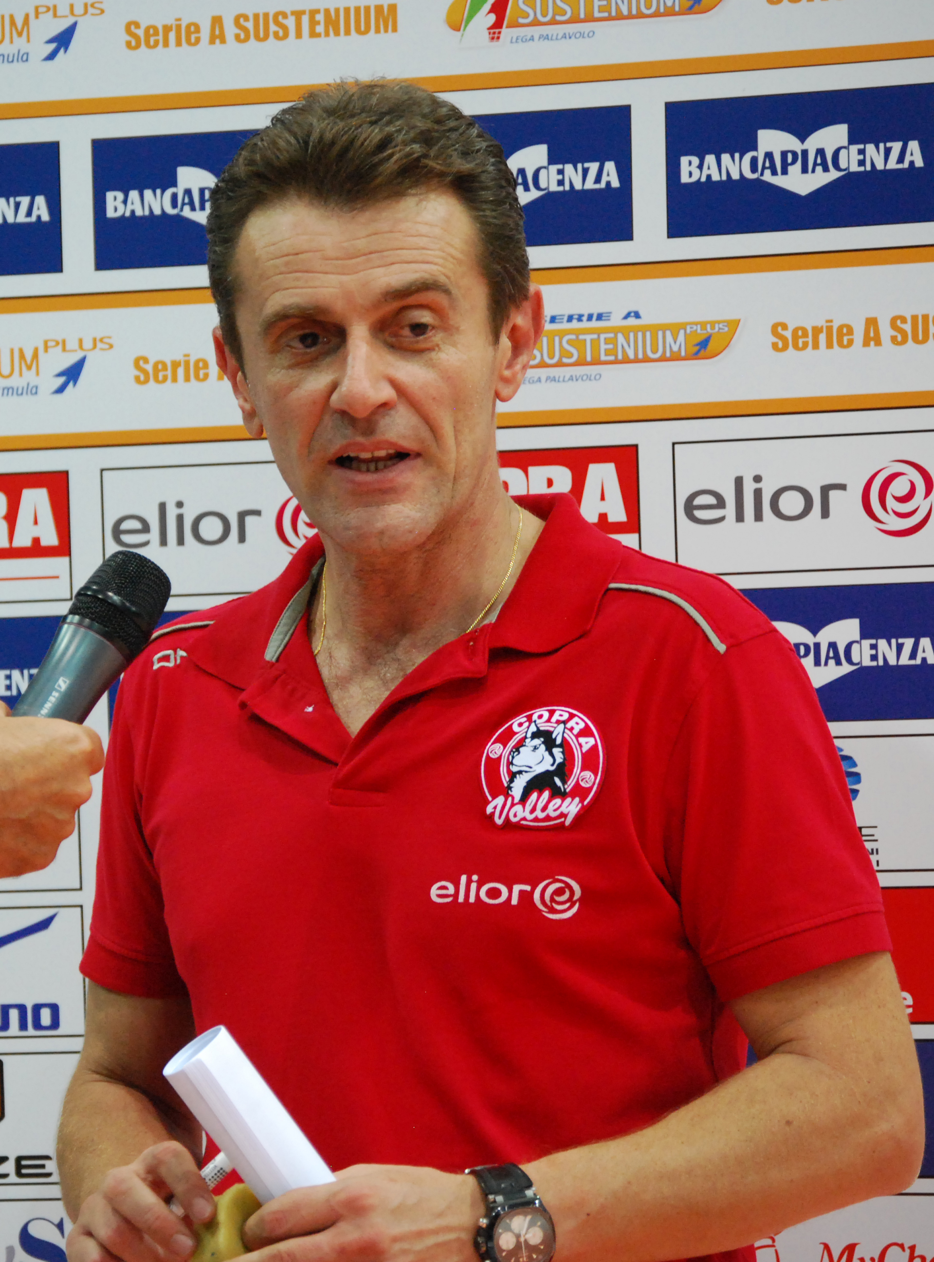 Foto che ho scattato al Palabanca di Piacenza in occasione della partita Copra-Trento